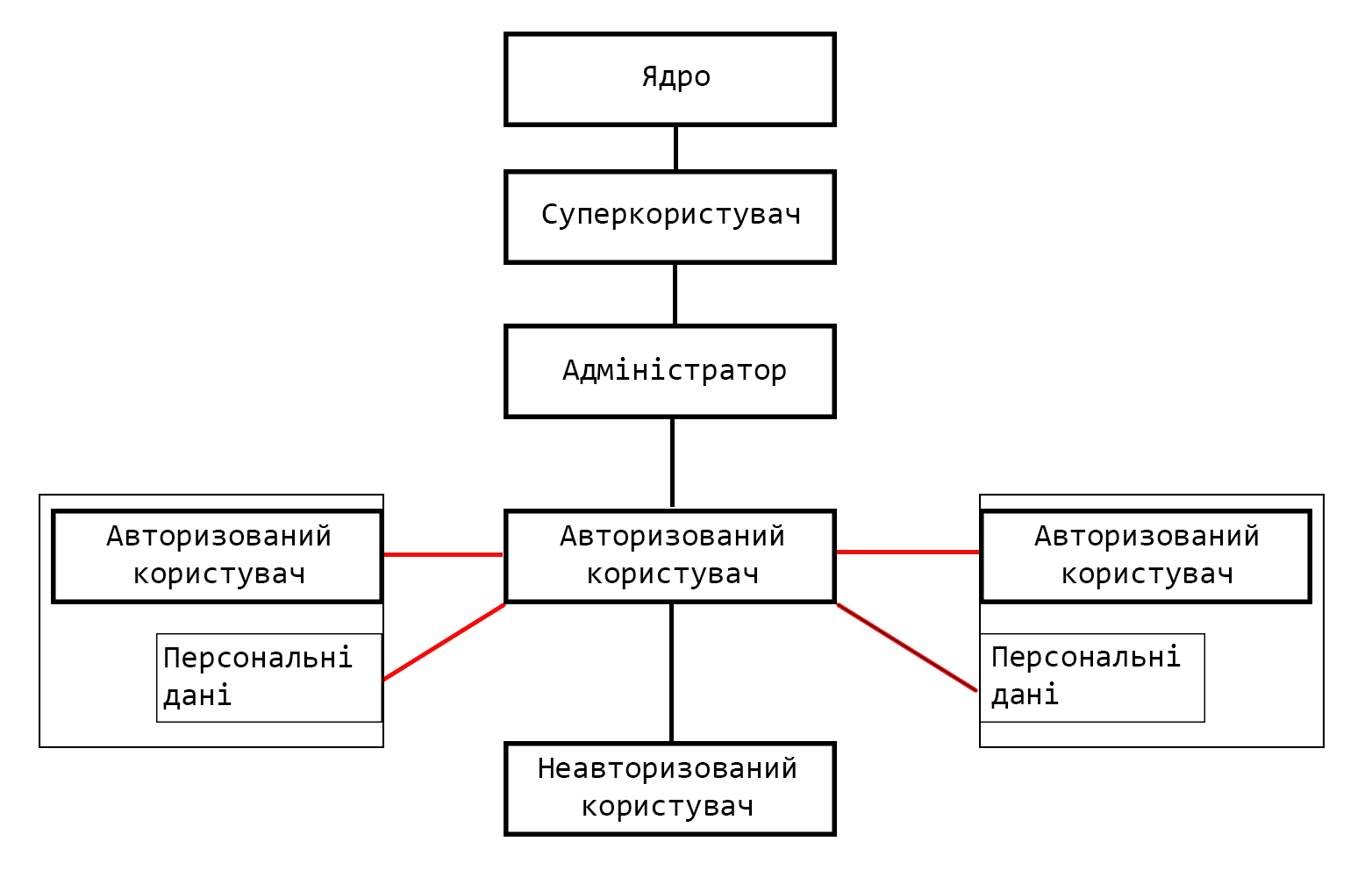 Red lines mean horizontal elevation and the black ones mean the vertical.